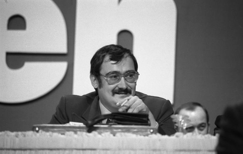 FDP-Bundesparteitag 1975 in der Rheingoldhalle, Mainz (Ullrich Krüger)